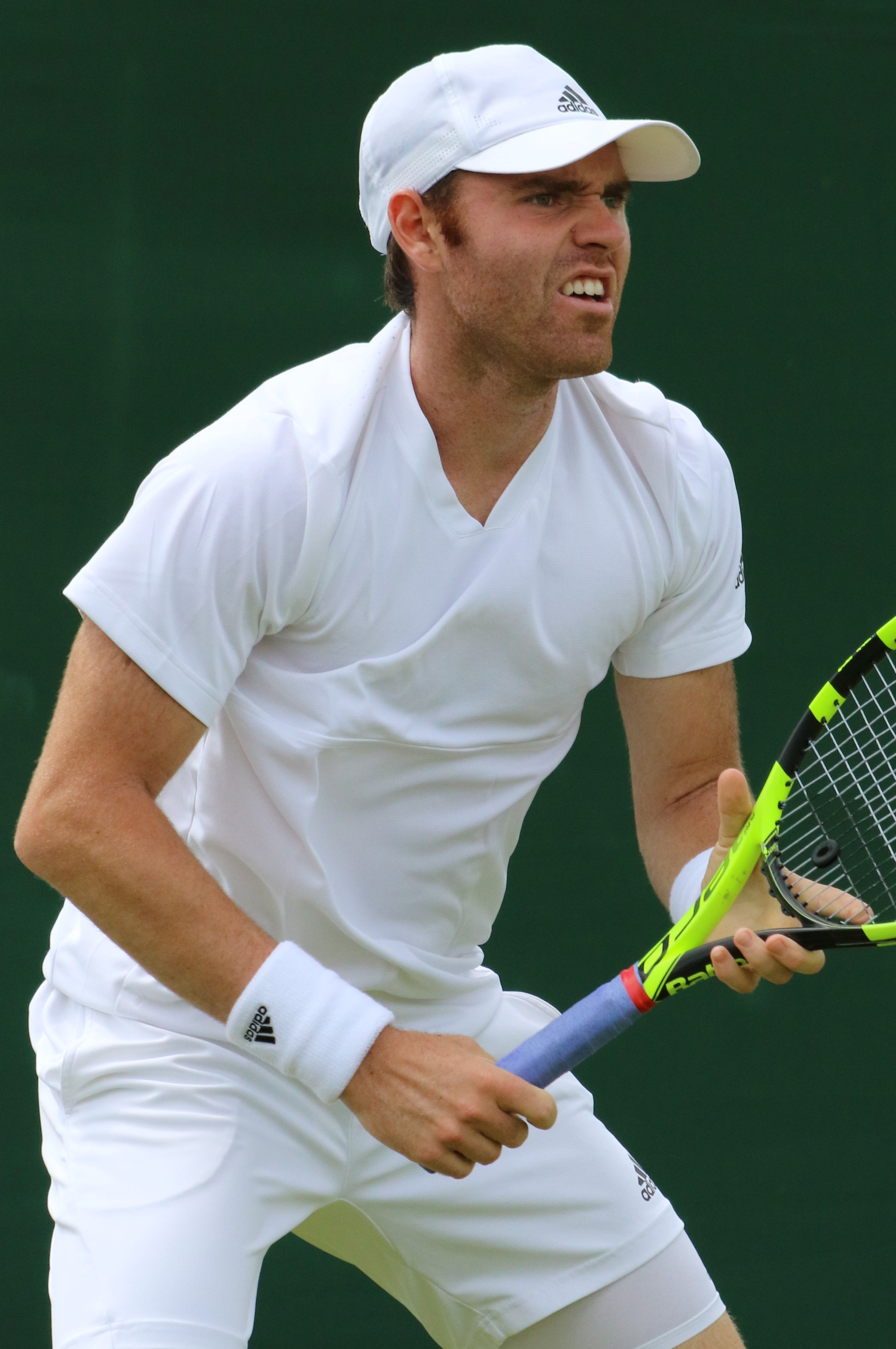 Fratangelo WMQ16 (6)